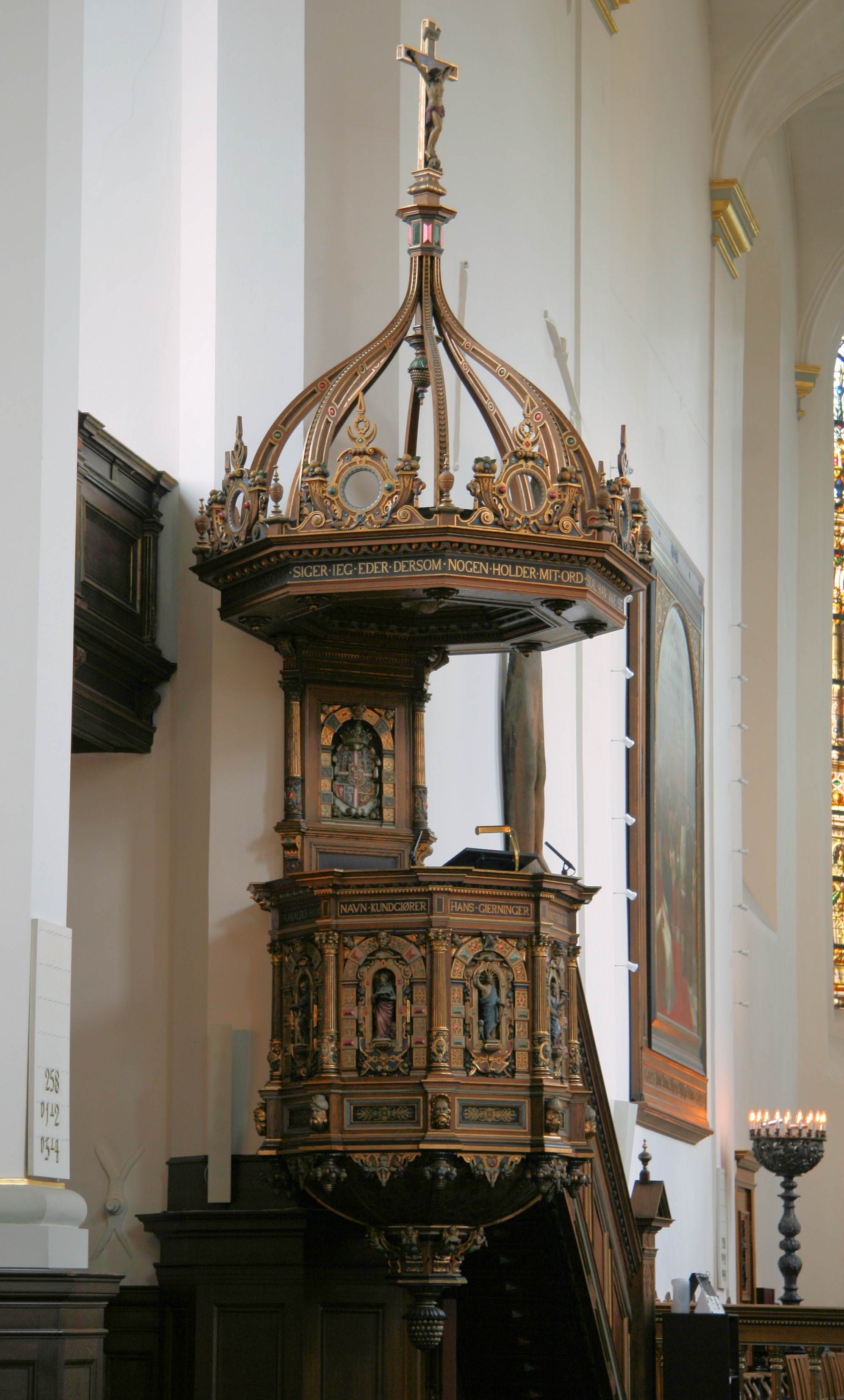 Helligåndskirken, Copenhagen, Denmark. Pulpit